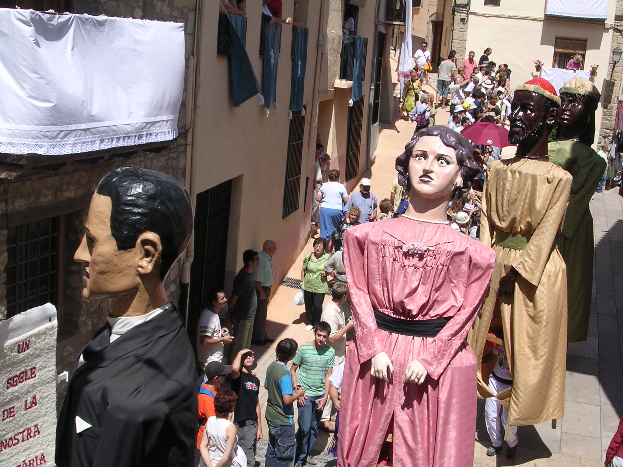 Els gegants de Morella (Castelló) (Spain)